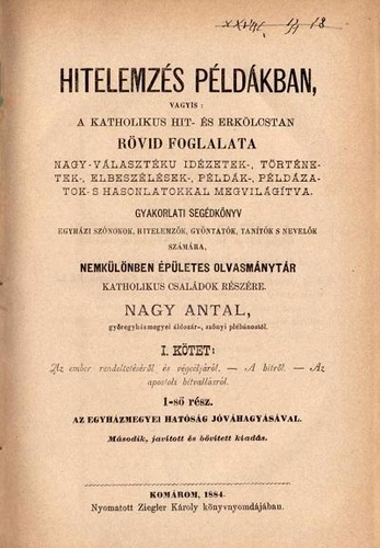 A Hitelemzés példákban első kötetének címoldala.